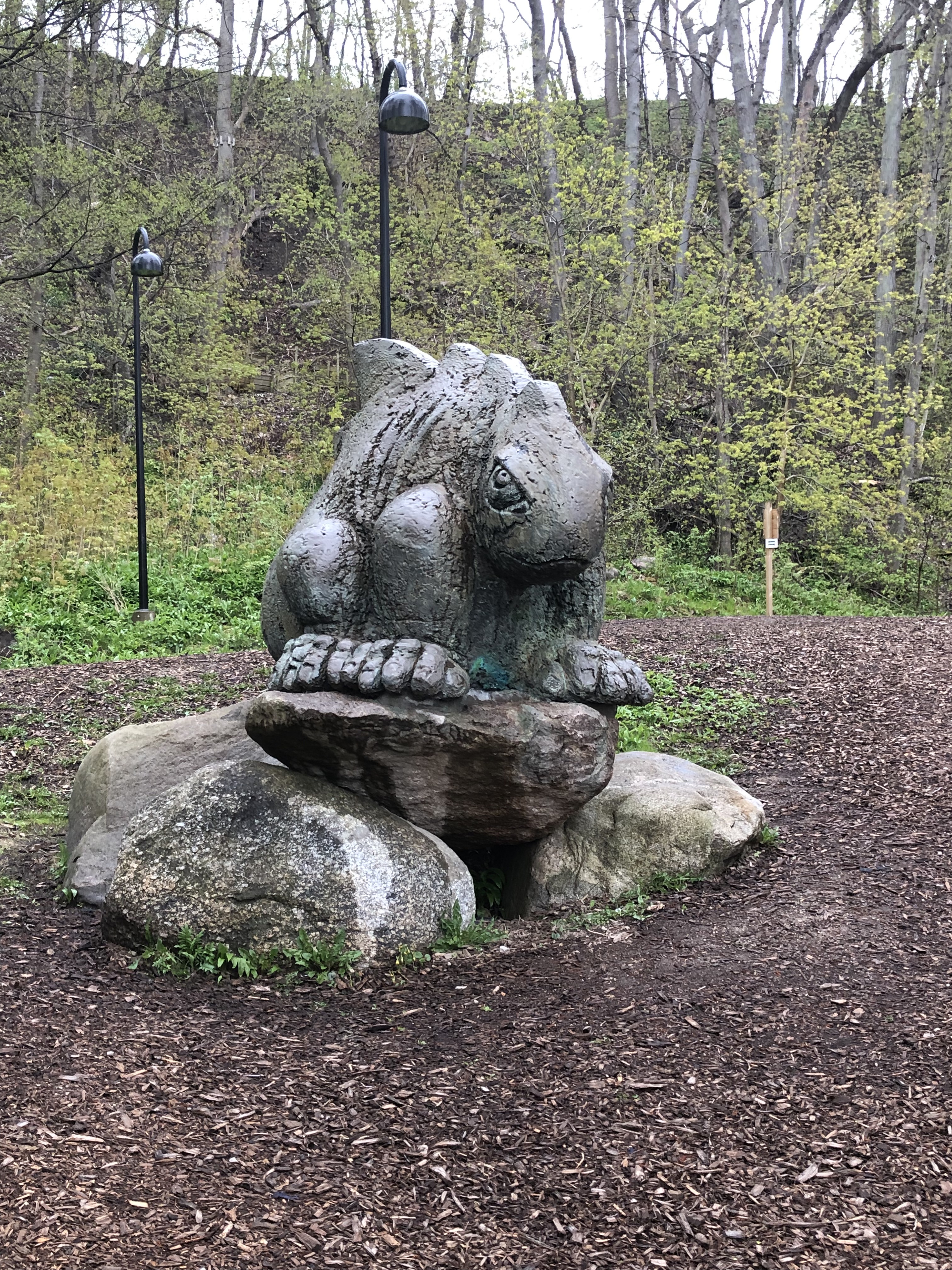 Põhja Konna kujutis Viimsis